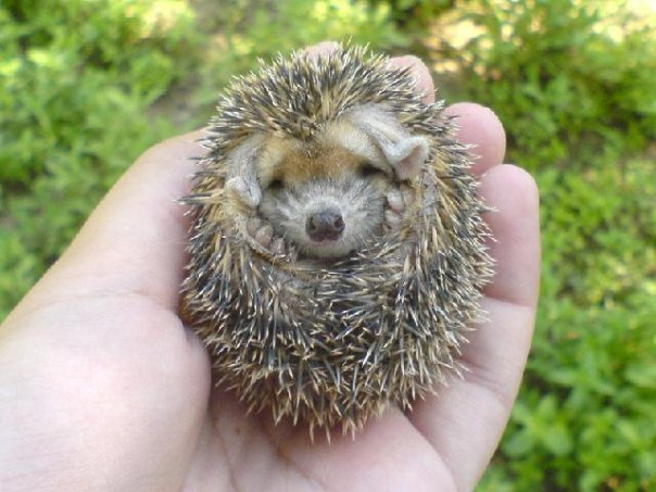 Jež